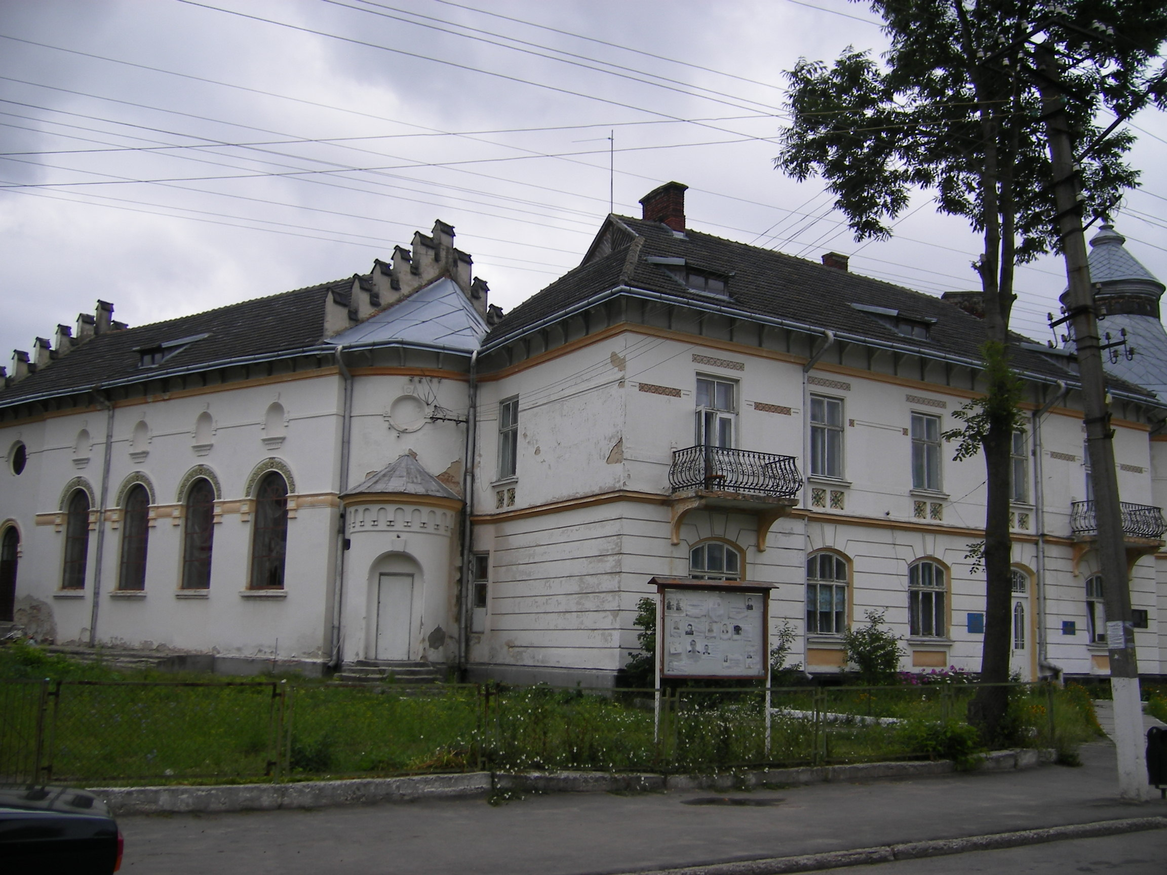 Radekhiv